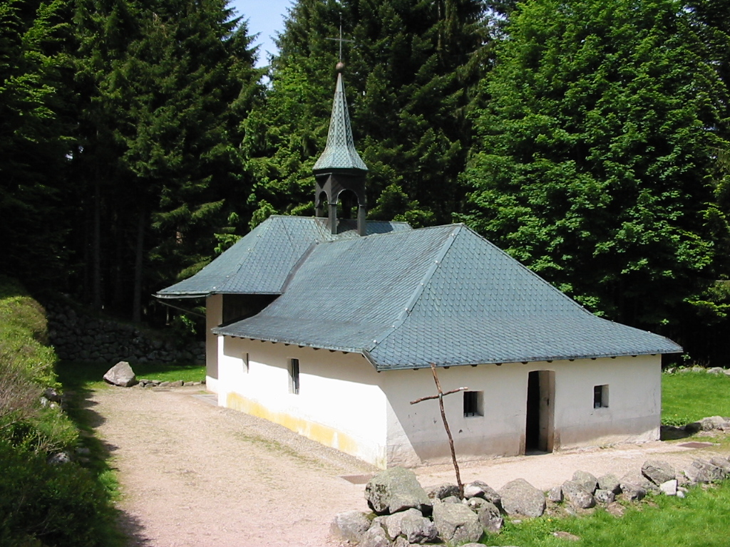 Ermitage Frère Joseph Commune de Ventron, dans le massif des Vosges. Chapelle Frère-Joseph. Photo personnelle du 7 juin 2006. Copyright © Christian Amet